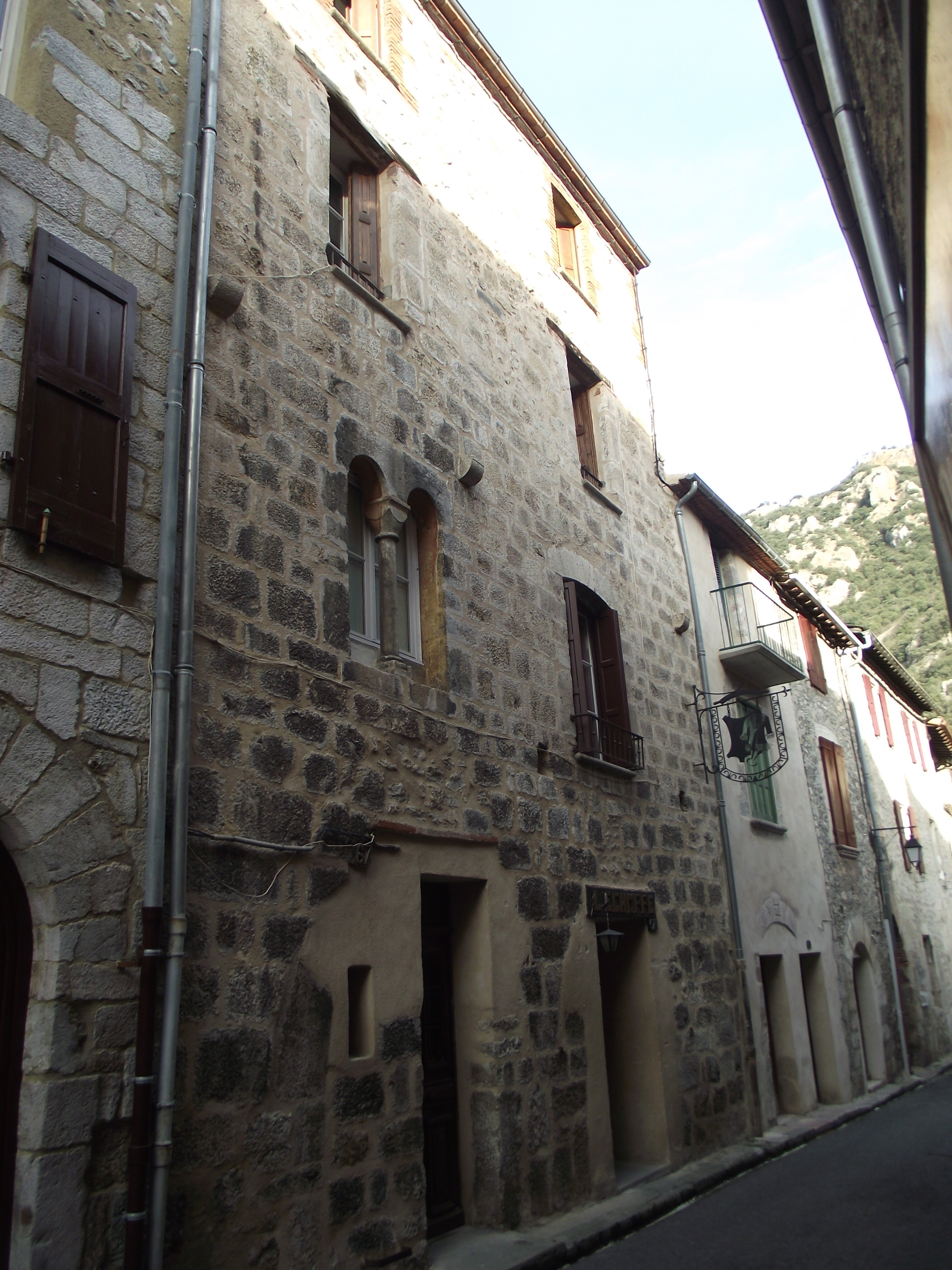 Casa d'Inès de Llar (Vilafranca de Conflent)